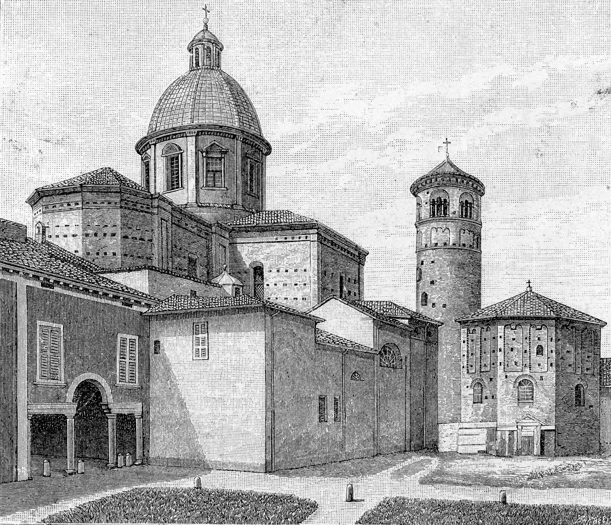 Ravenna: Parte posteriore della Cattedrale e del Battistero (xilografia di Giuseppe Barberis).